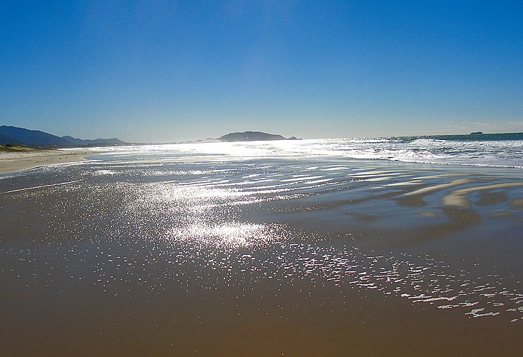 Inverno de 2004 (Julho) Lado norte Praia do Campeche - Florianópolis - SC - Brasil Autor: André Sant'Anna